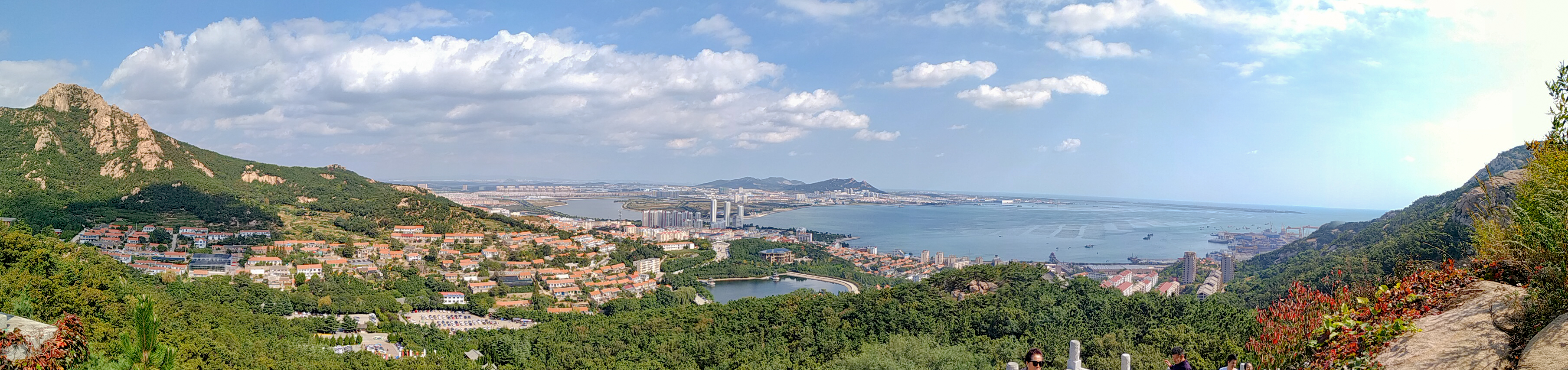 石岛全景图